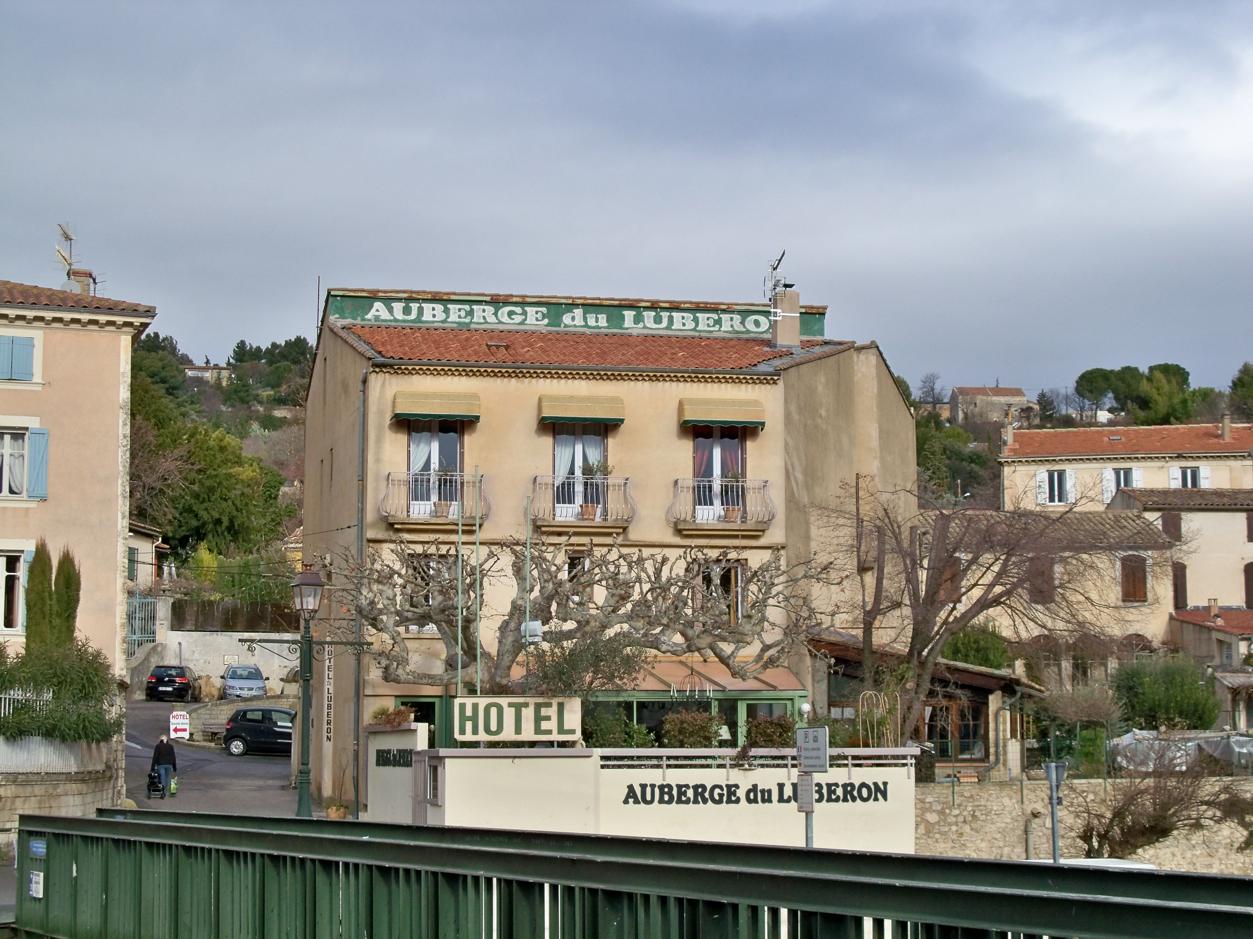 Auberge du Luberon à Apt (Vaucluse, France)